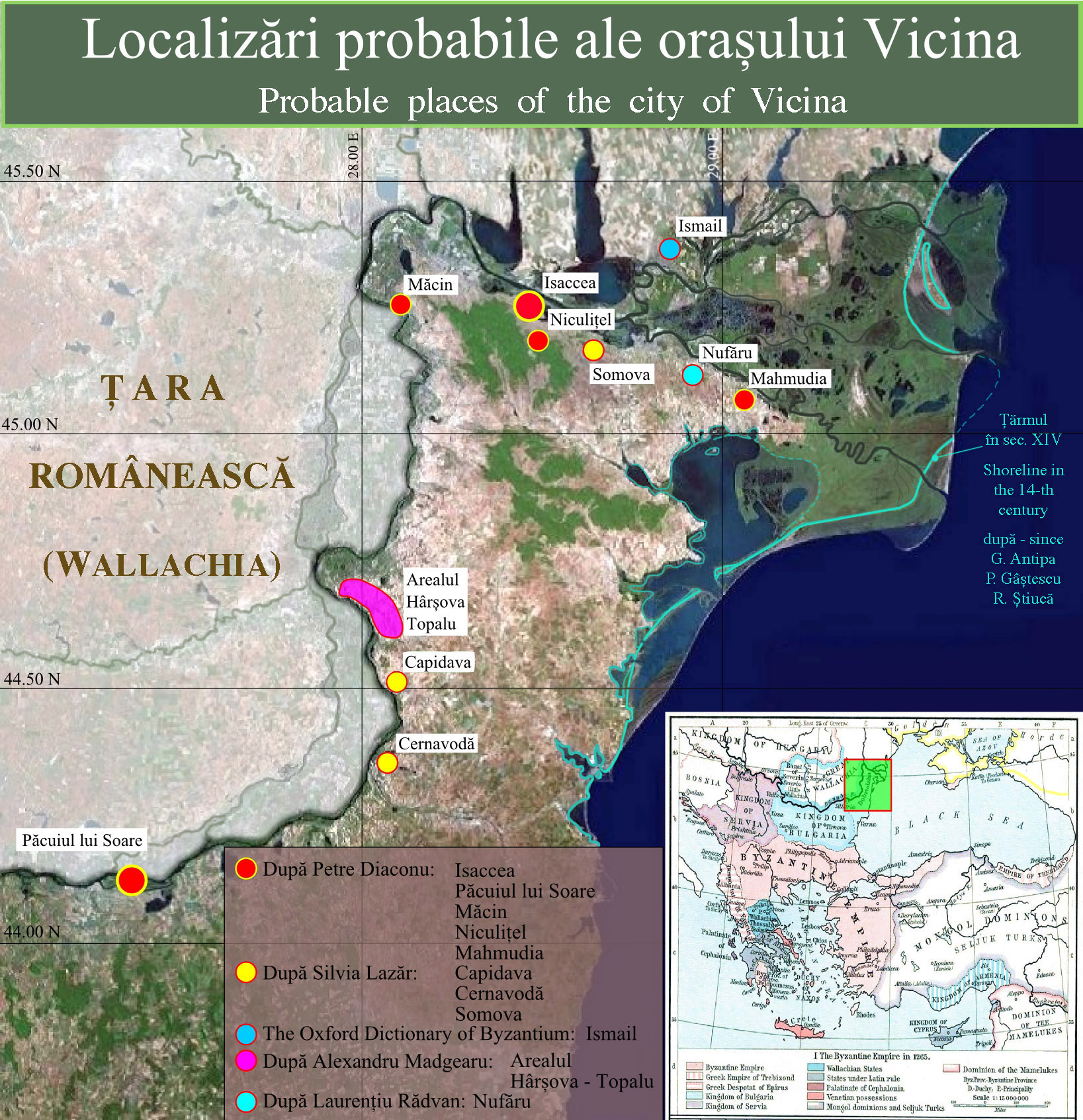 Localizarea orașului Vicina